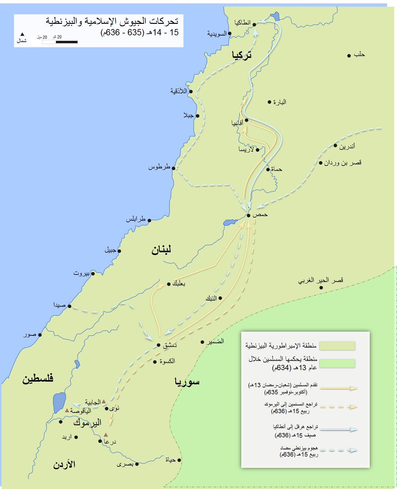 خارطة تُظهرُ تحركات الجُيوش الإسلاميَّة والبيزنطية زمن الخِلافة الرَّاشدة.